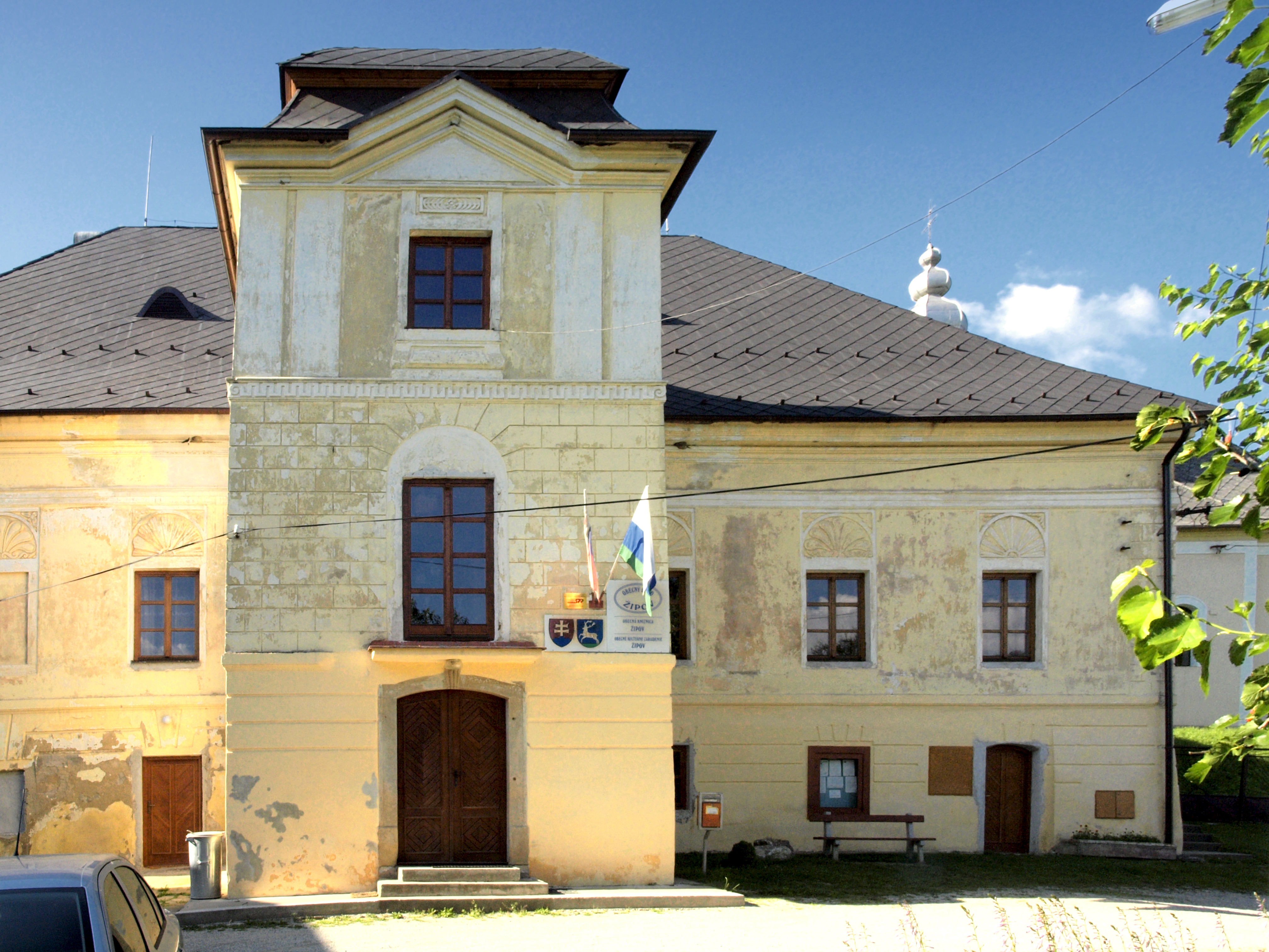 Žipov (Slovakia) - L'ancien manoir (Obecný úrad)